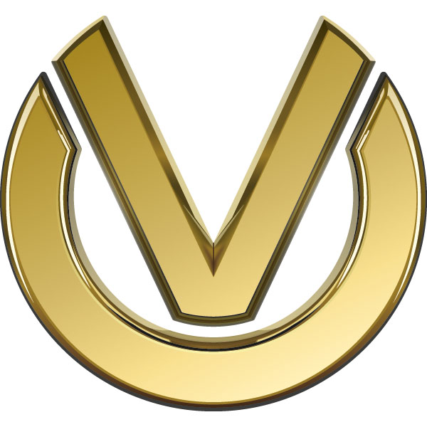 Logo der Deutschen Vermögensberatung (DVAG)